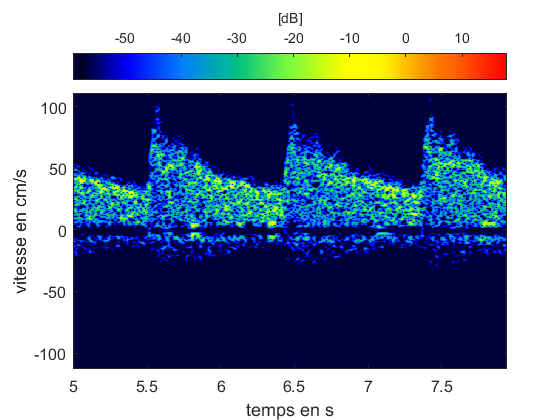 Flux sanguin en cm/s en fonction du temps en s chez une personne saine.